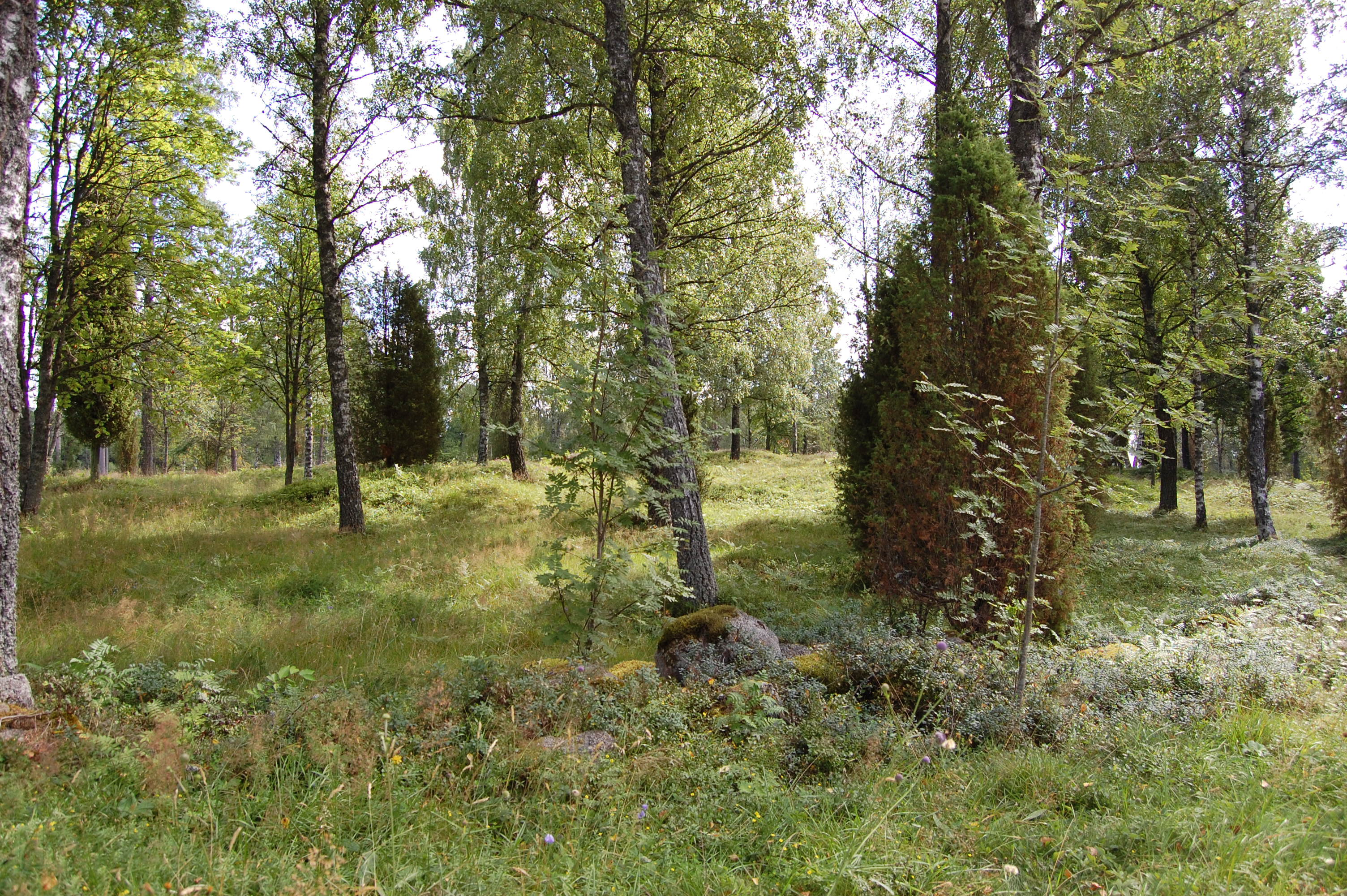 Gravfält, RAÄ-nummer: Skepperstad 14:1